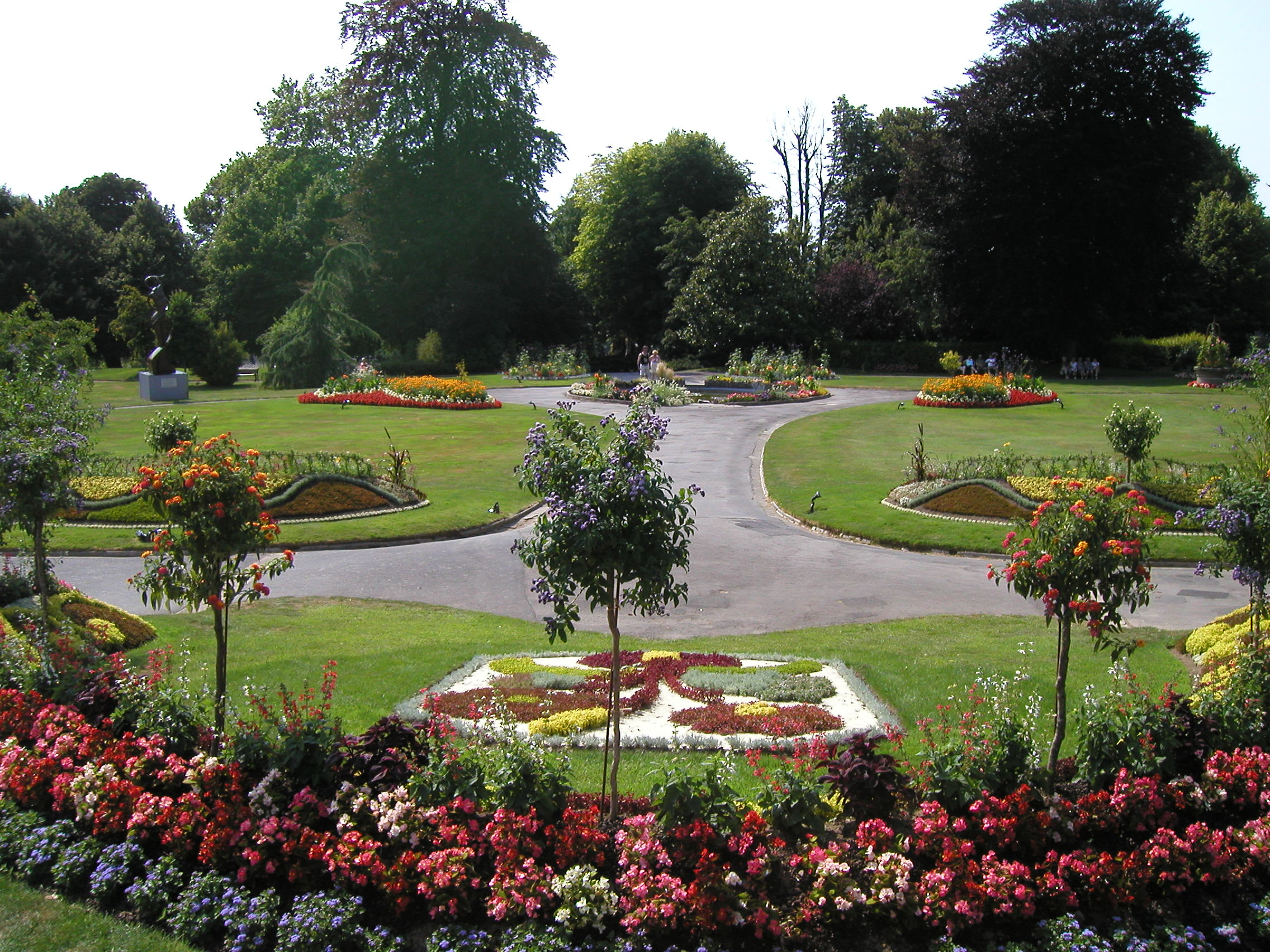 Pflanzengarten in Avranches, Frankreich